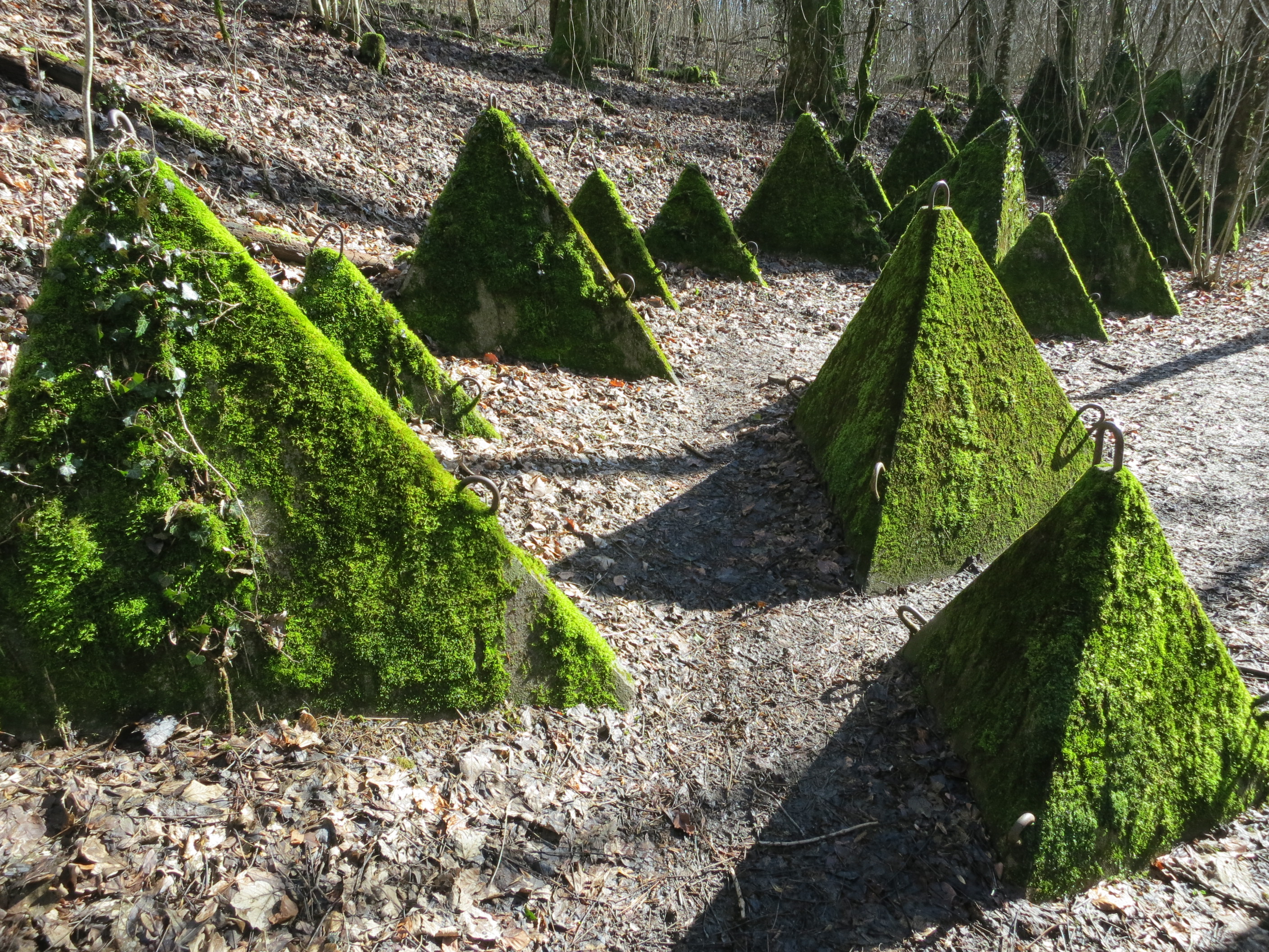 Panzersperre, Begnins VD, Schweiz